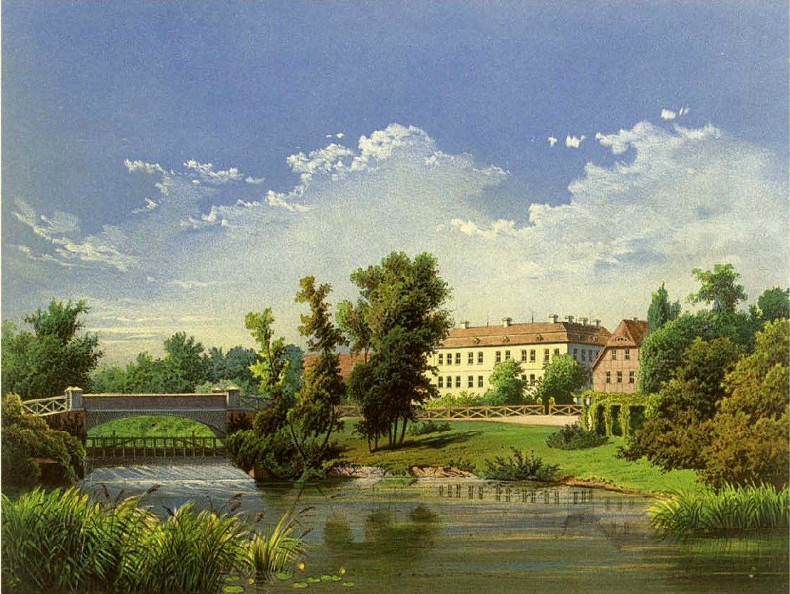 Schloss Wolfshagen, Kreis West-Prignitz, Lithografie aus dem 19. Jahrhundert